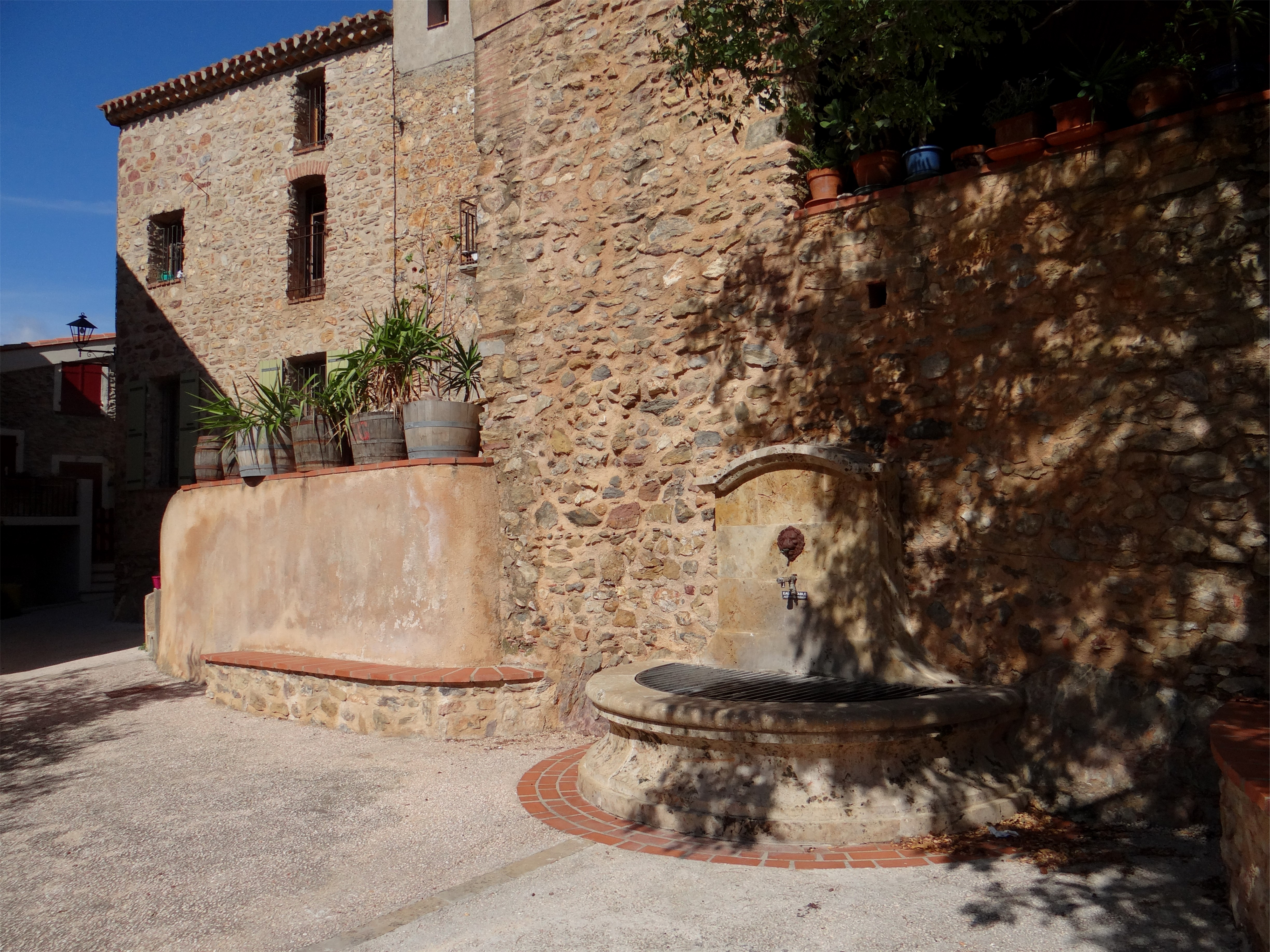 Fontaine à l'entrée de la rue du four, Calce, Pyrénées-Orientales.